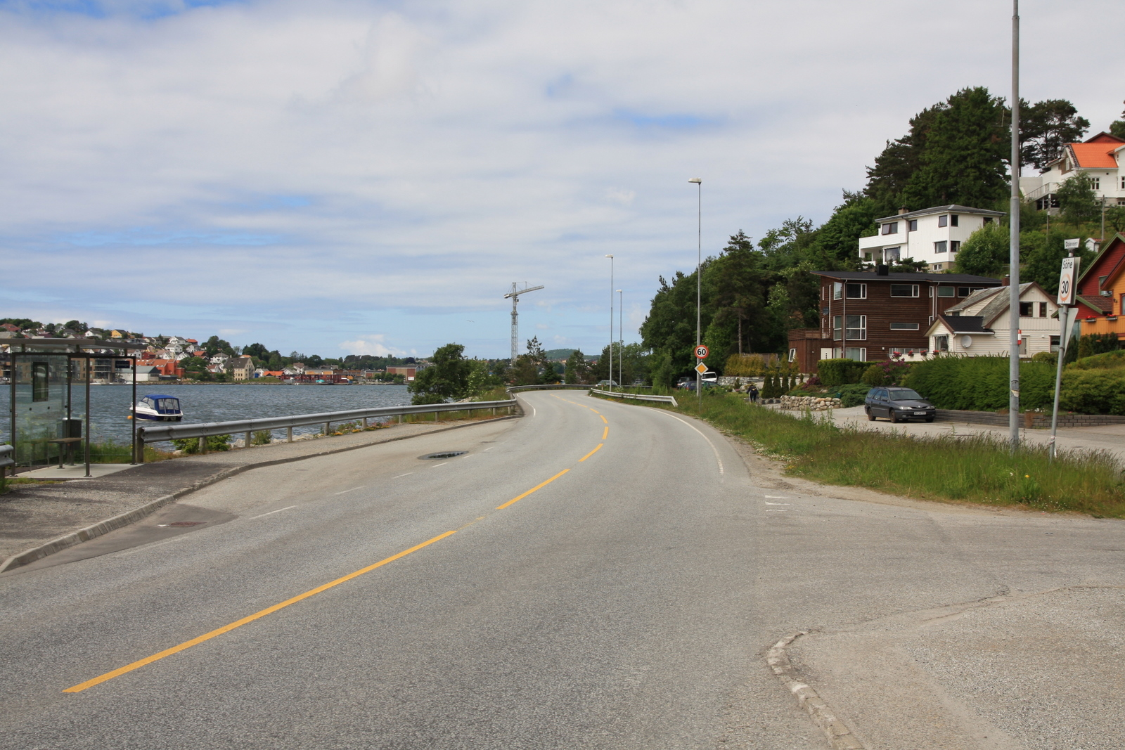 Fylkesvei 317 (Daleveien)